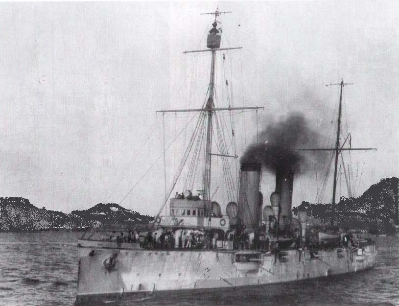 SMS Szigetvár